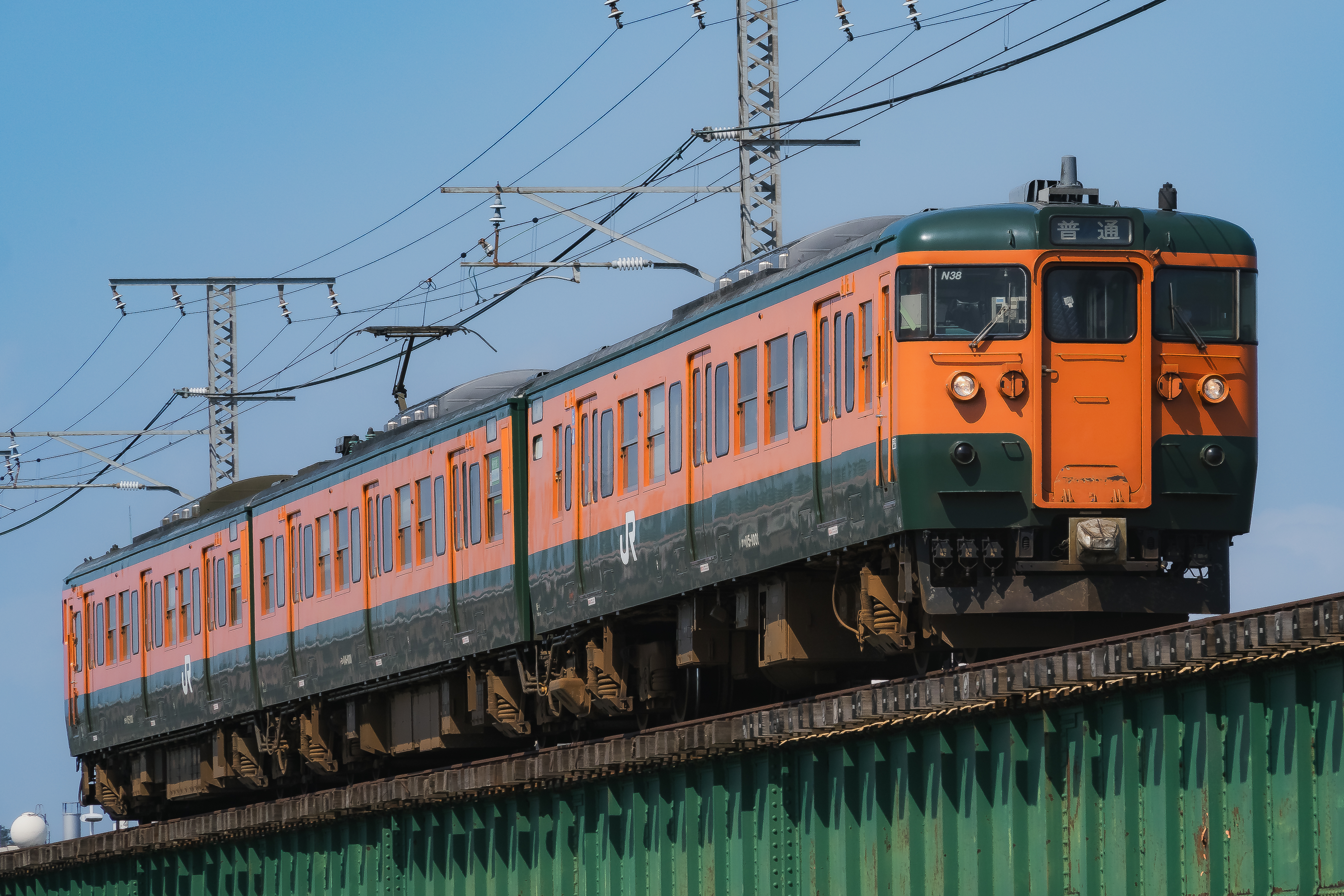 越後線白山～新潟間の信濃川橋梁を渡る、新潟車両センター所属の115系N38編成。この編成は、両先頭車が1000番台トップナンバーである。